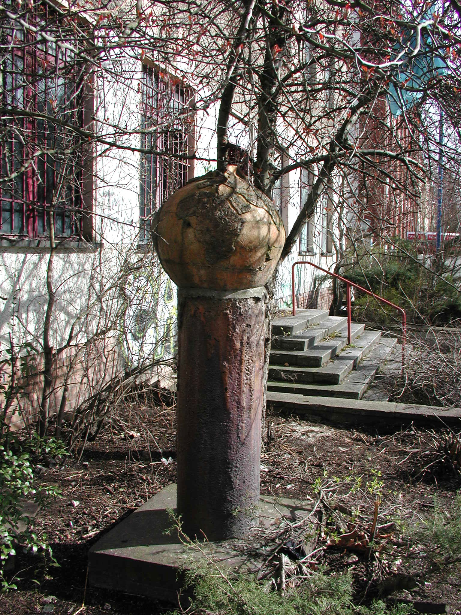 Säule (2)